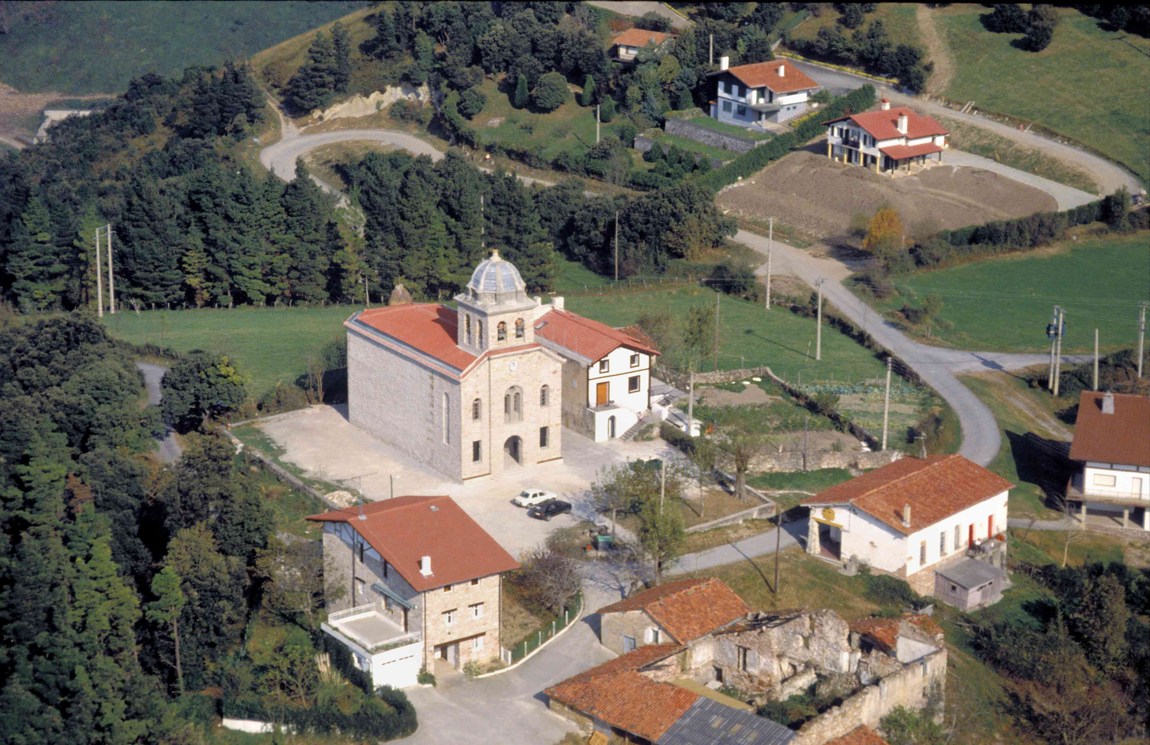 Artadi auzoa (Zumaia)